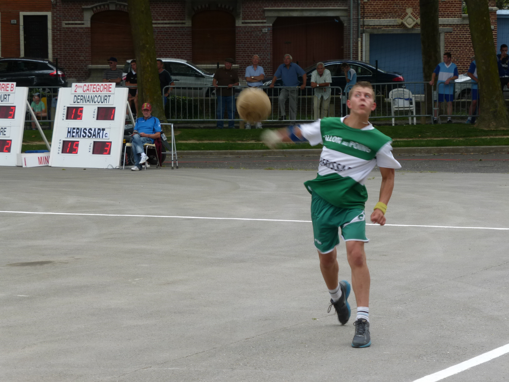 championnat de France 2013 - AmiensPicard: campionnat d' Franche éd Balon au poing - 2013 - parc éd la Hotoie (Anmien)